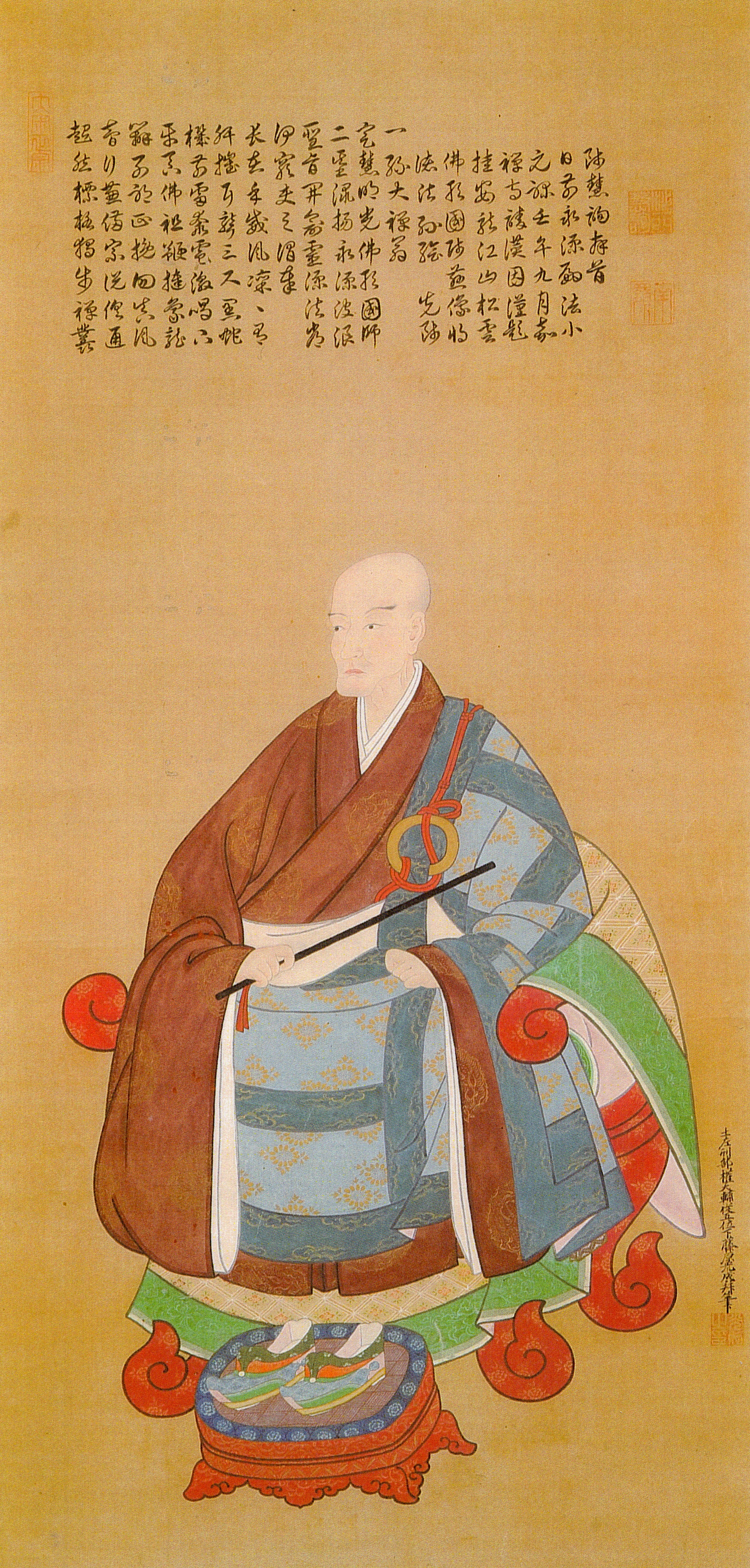 一糸文守の頂相。